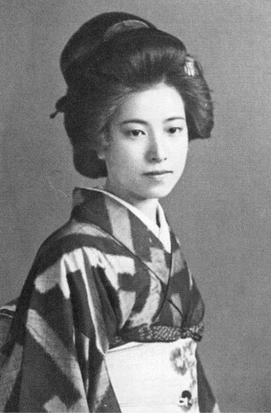 太宰治の愛人山崎富栄